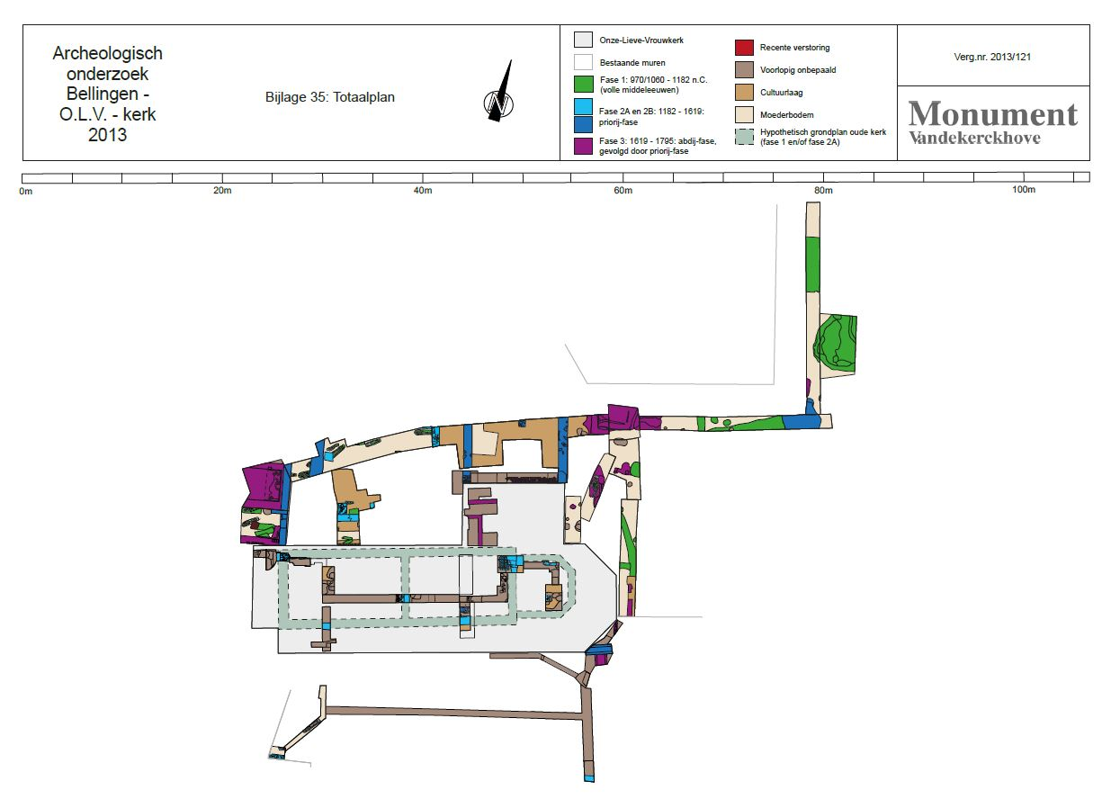 abdij van Cantimpré (Cantimpret) van Bellingen:Totaaloverzicht van de archeologische site